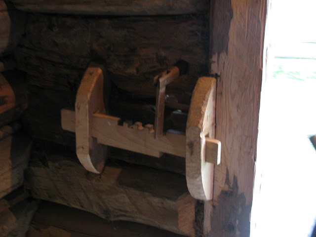 Дверний замок в будинках Карпатського регіону